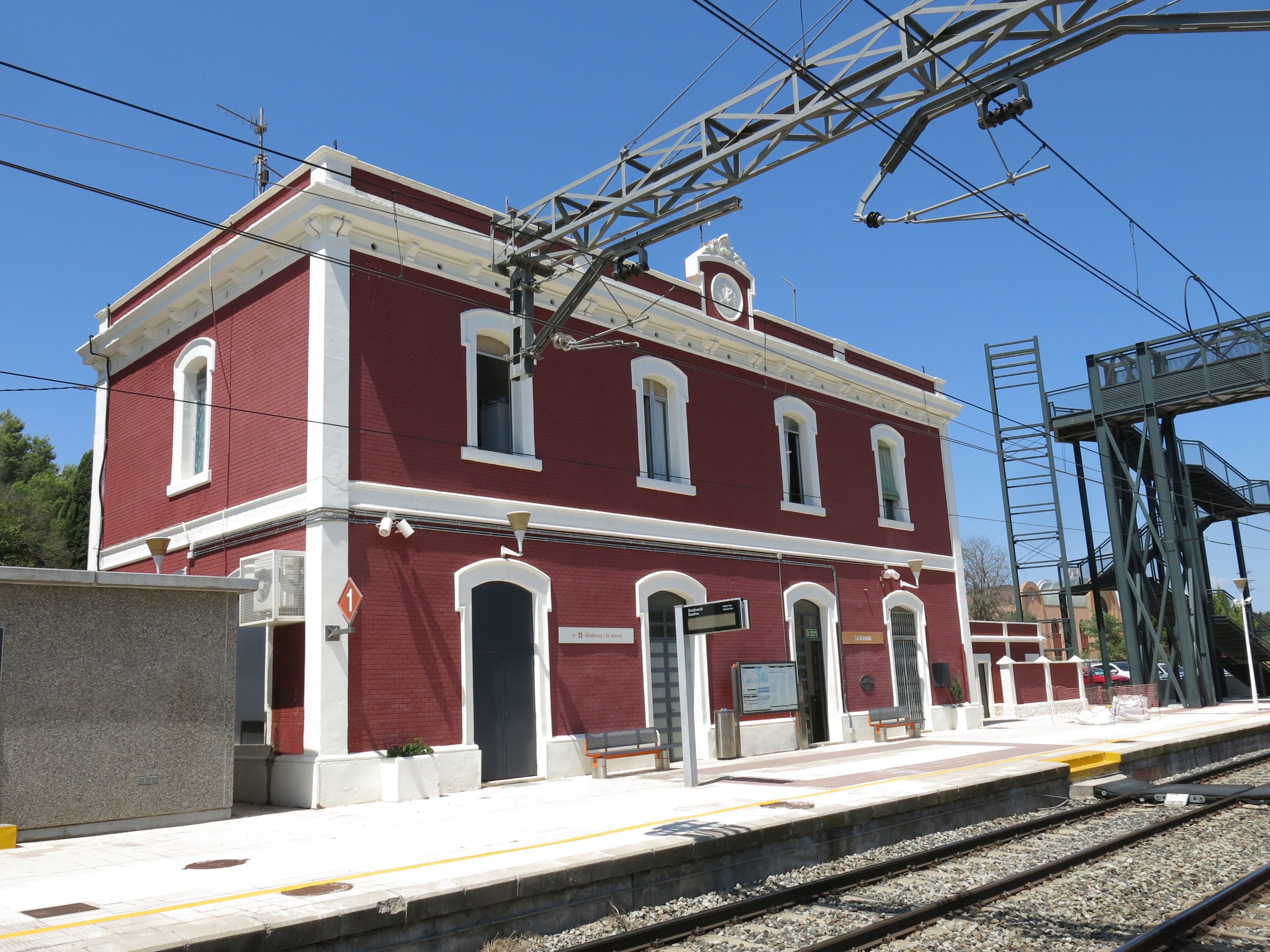 Estació de ferrocarril de la Granada